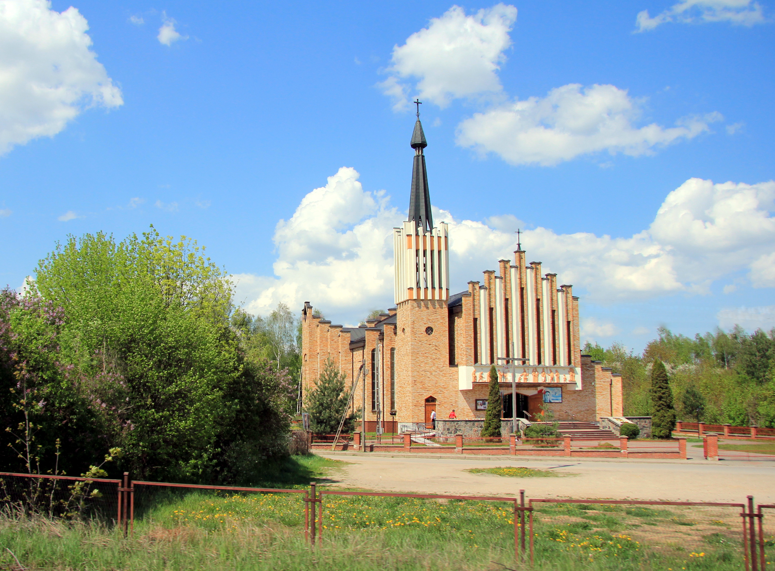 Łapy kościół św. Jana Chrzciciela, woj. podlaskie